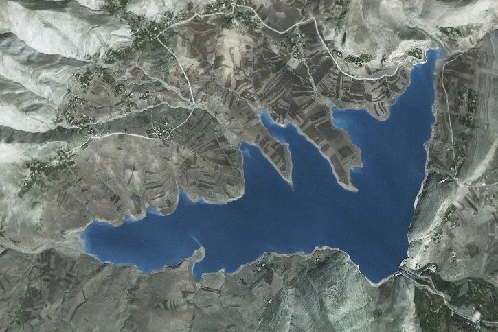 Image satellite du barrage Sidi Kasseb, Tunisie